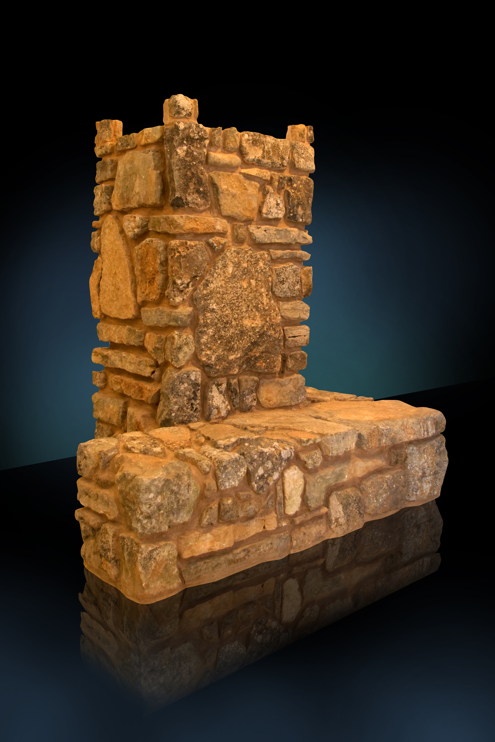 מזבח העולה במכון המקדש. האמן אסף קדרון